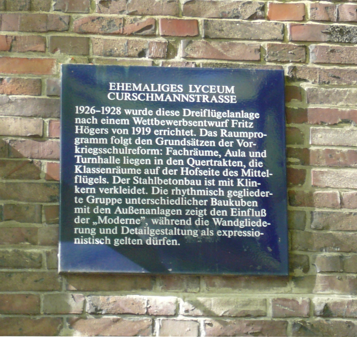 Gesamtschule Stadtteilschule Eppendorf -Högerbau Curschmannstraße- Infotafel